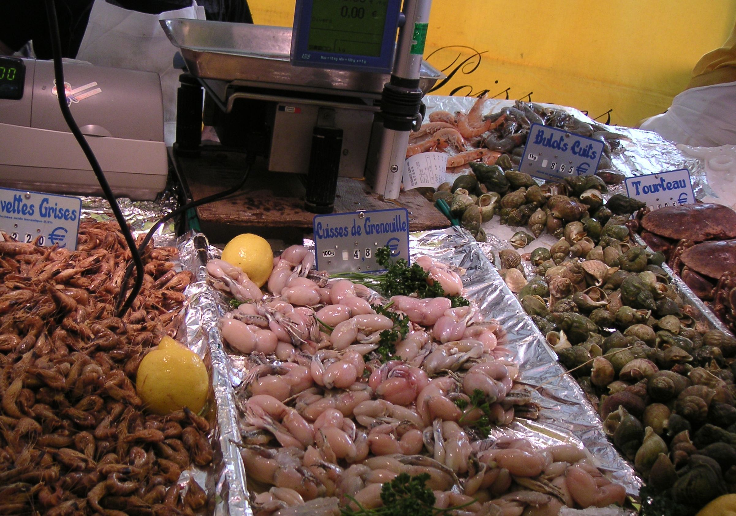 Granotes crues en una parada de peix d'un mercat a París